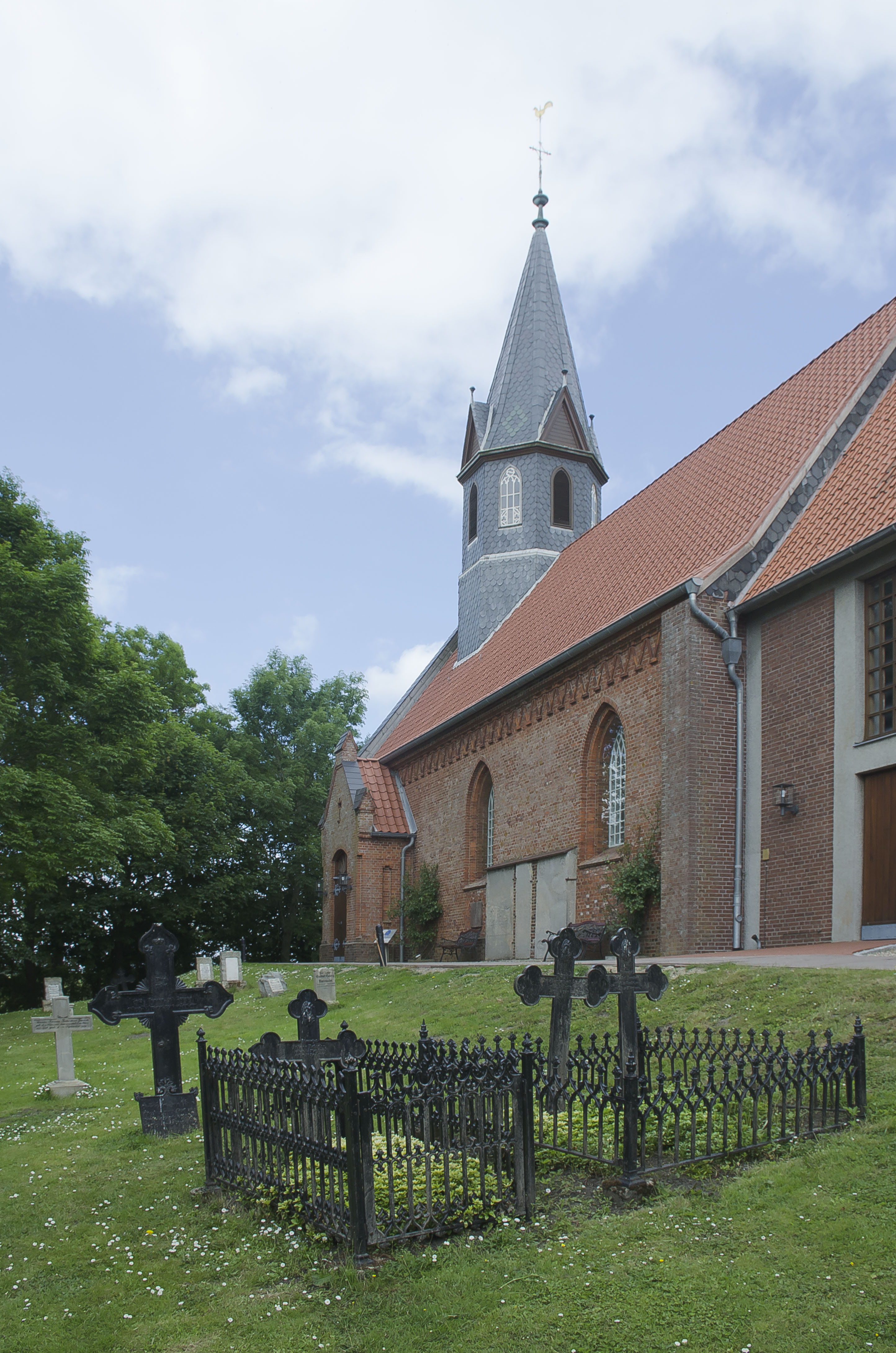 St.-Vinzenz-Kirche Odenbüll, Nordstrand, Nordfriesland